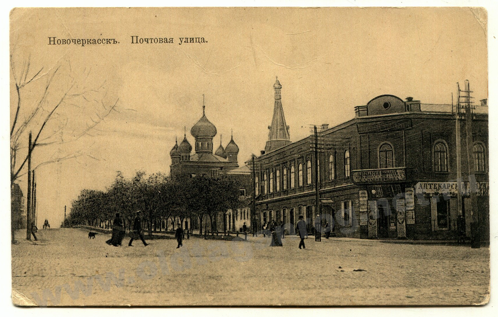 Новочеркасск Почтовая улица